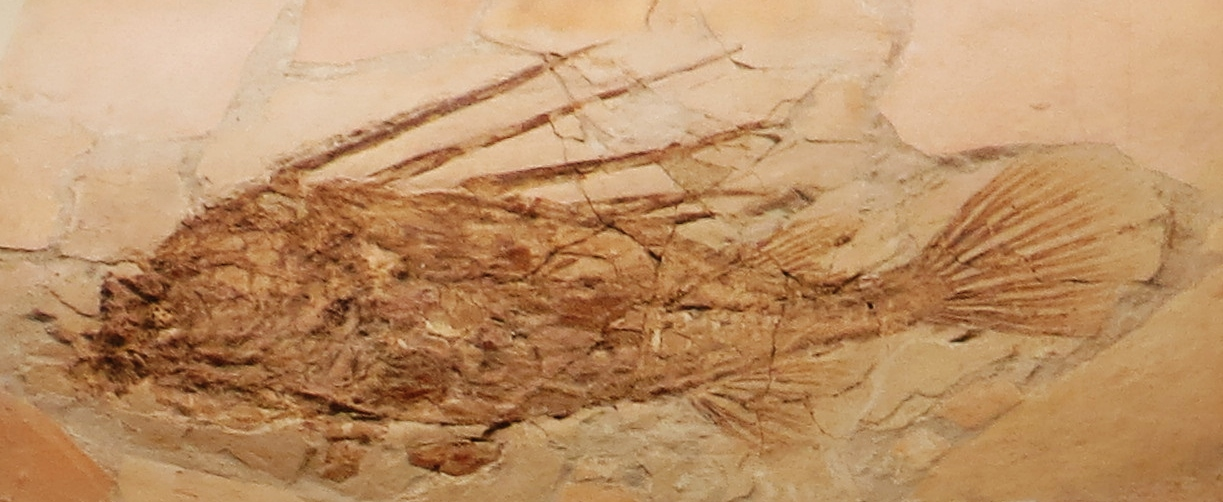 Fossil - Took the picture at Museo di storia naturale di Verona